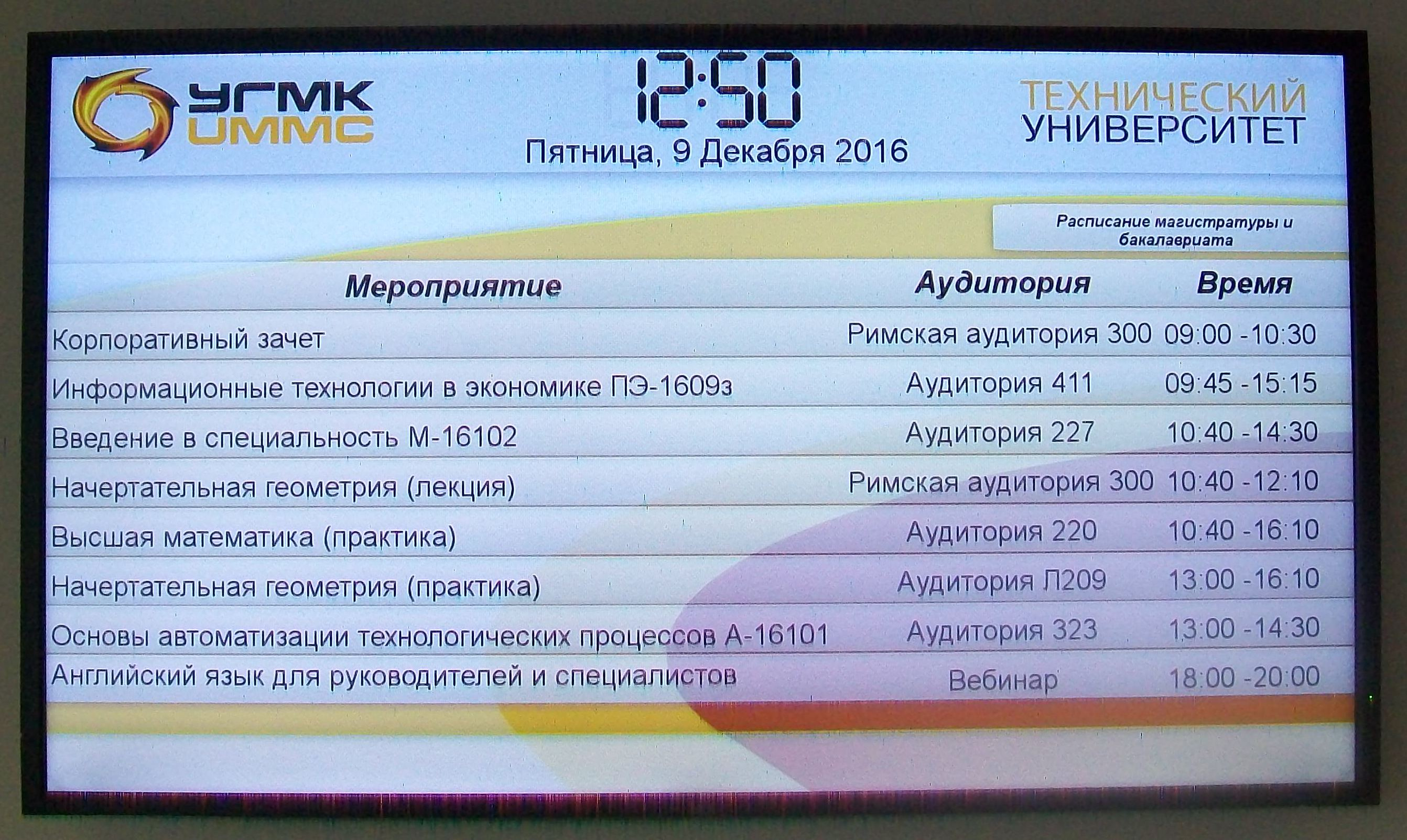 Расписание занятий в Техническом университет УГМК